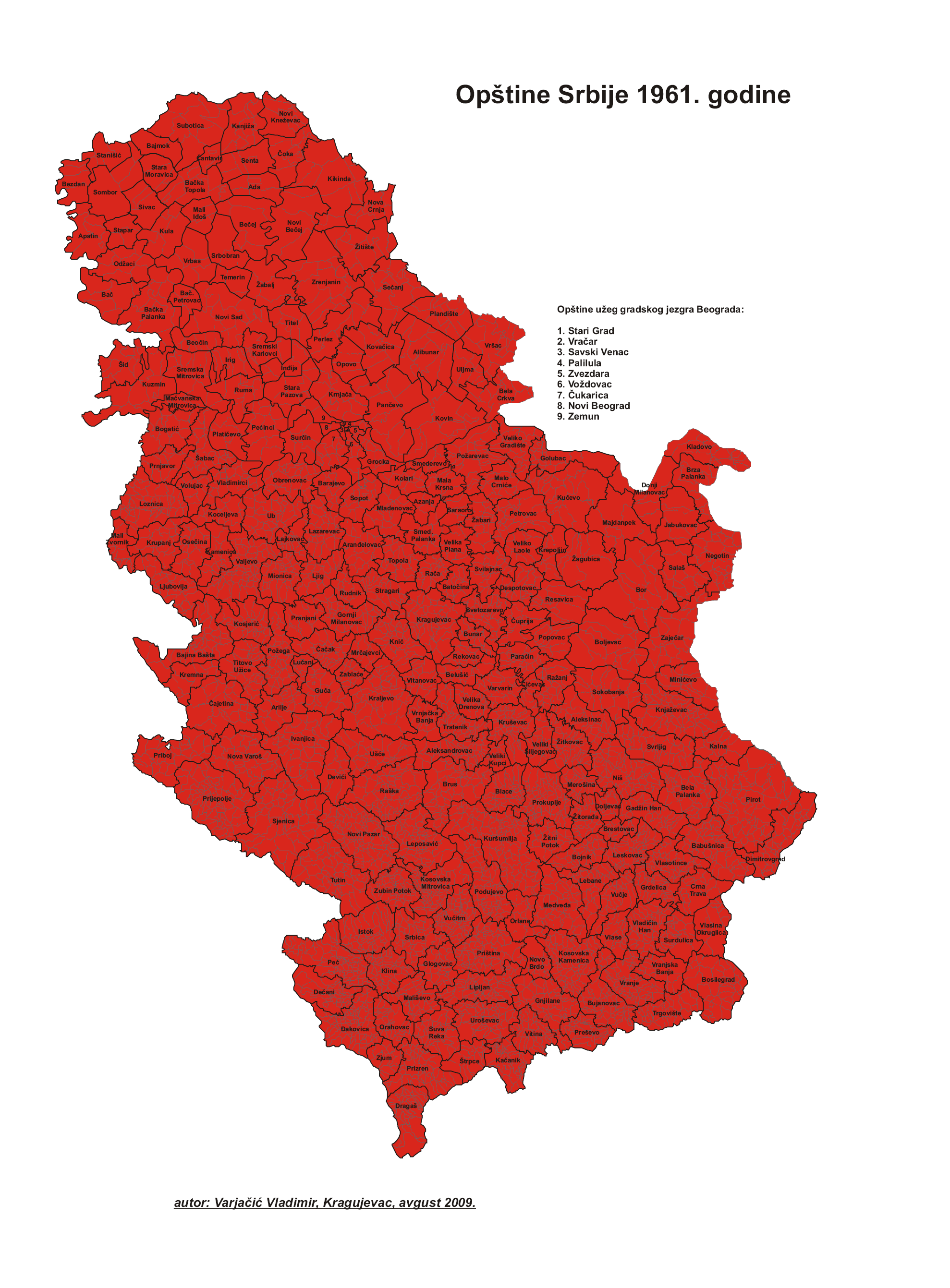 Општина СР Србије 1965. године